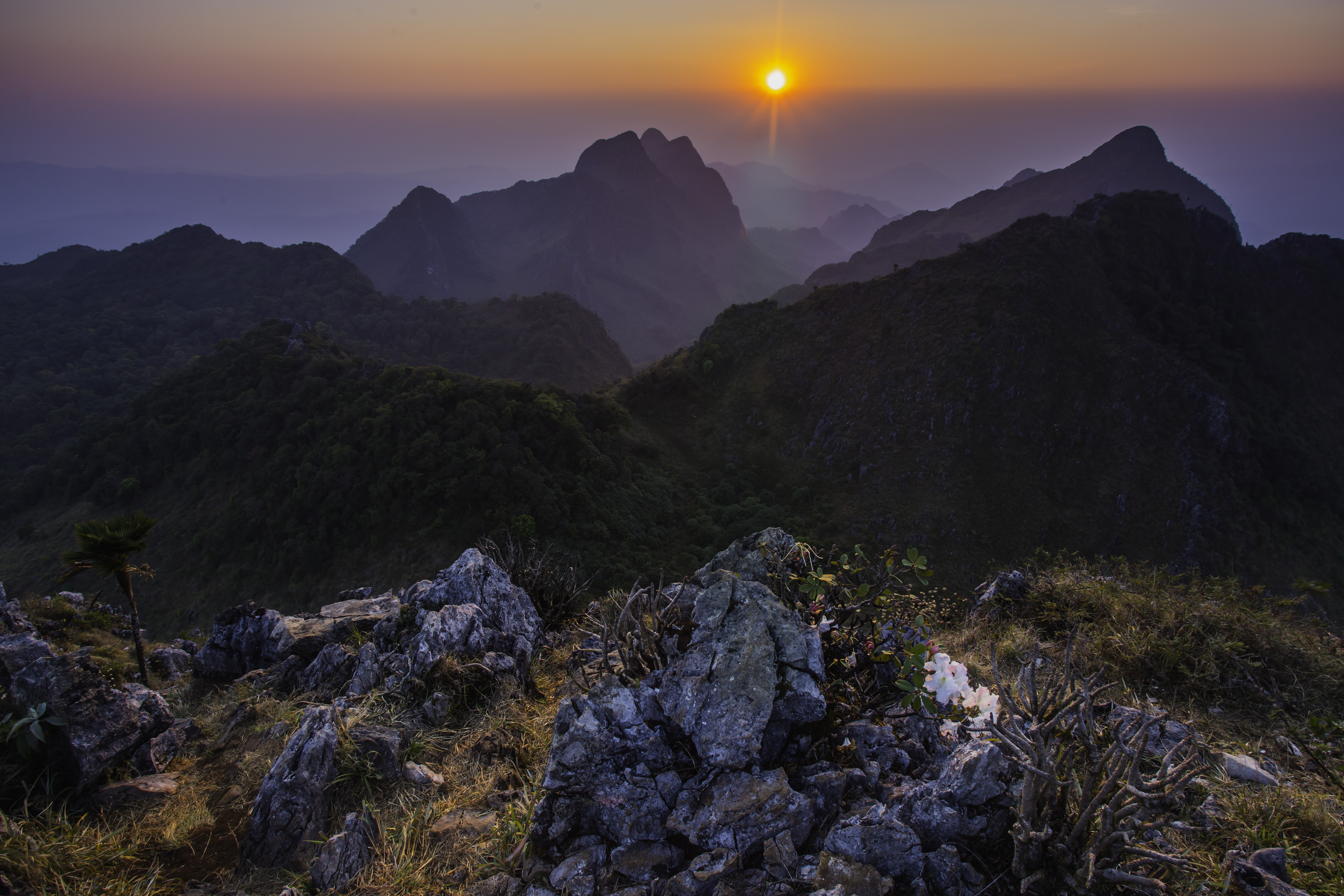 พระอาทิตย์ตก ณ ดอยหลวงเชียงดาว